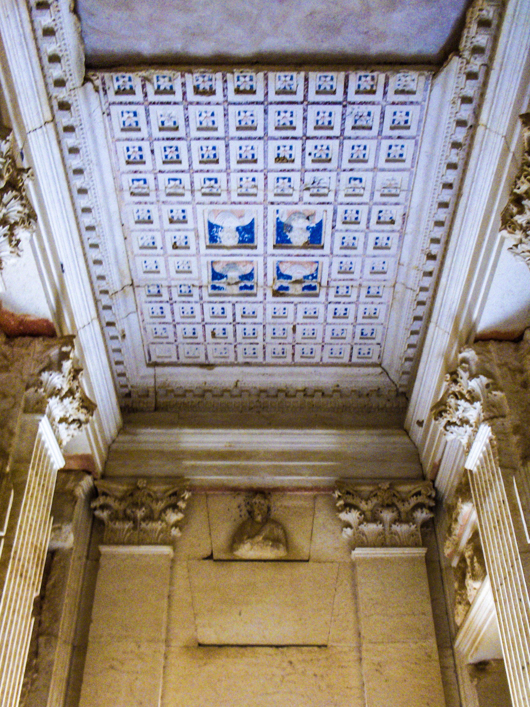 Soffitto del piano terra della tomba di Elahbel nella necropoli di Palmira